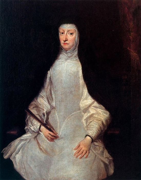 Retrato de la reina Mariana de Austria (1634-1696), que fue la segunda esposa del rey Felipe IV de España y la madre de Carlos II, durante cuya minoría de edad actuó como regente del reino.